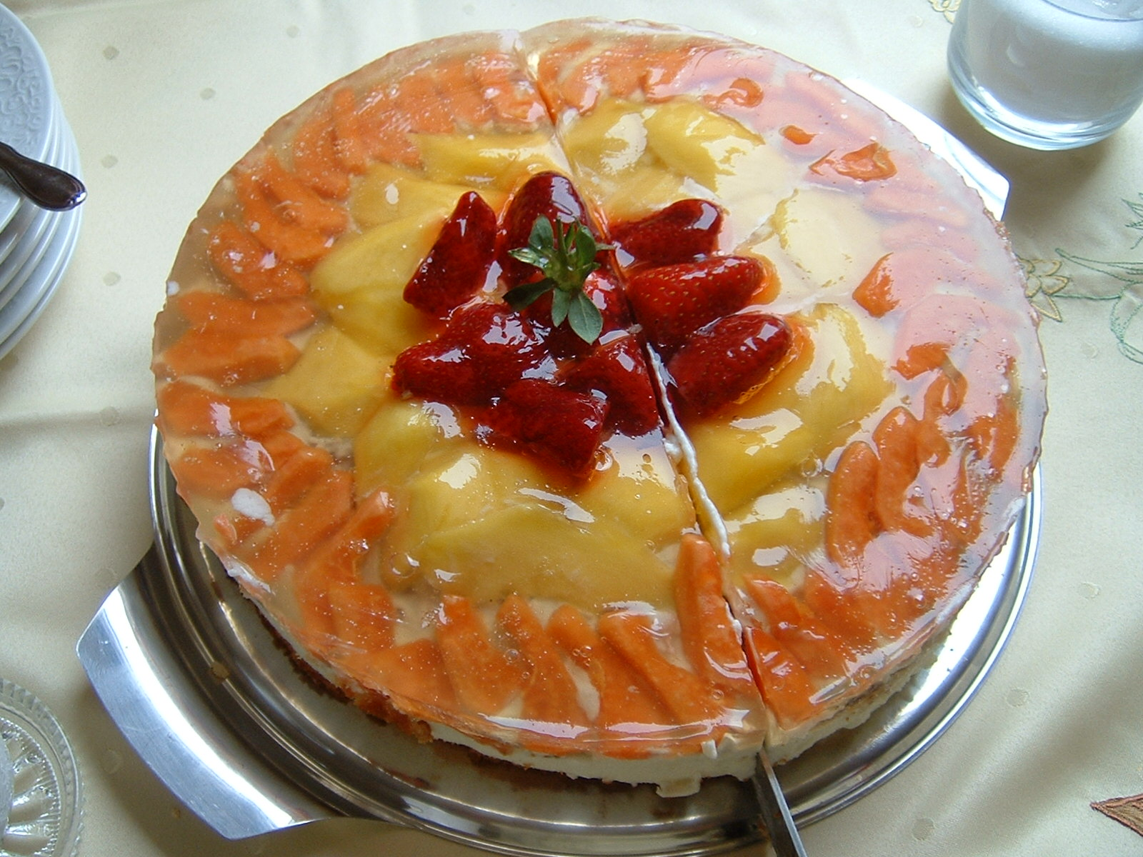 Obsttorte